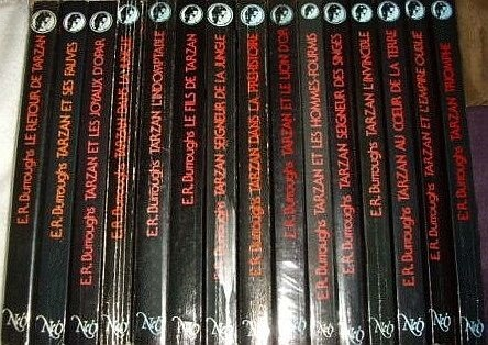 Tarzan en 14 volumes (NEO).